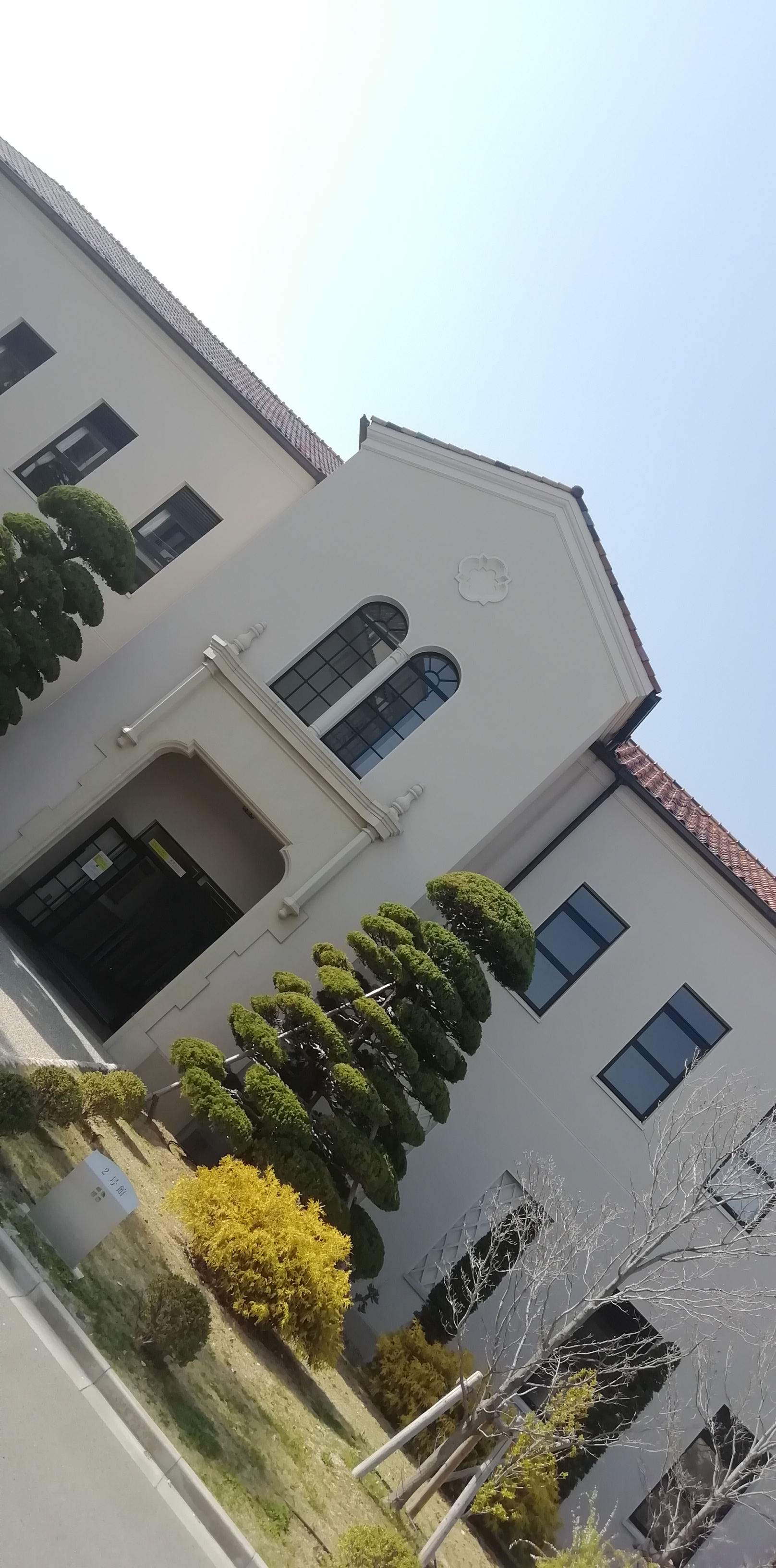 关西学院圣和2号馆